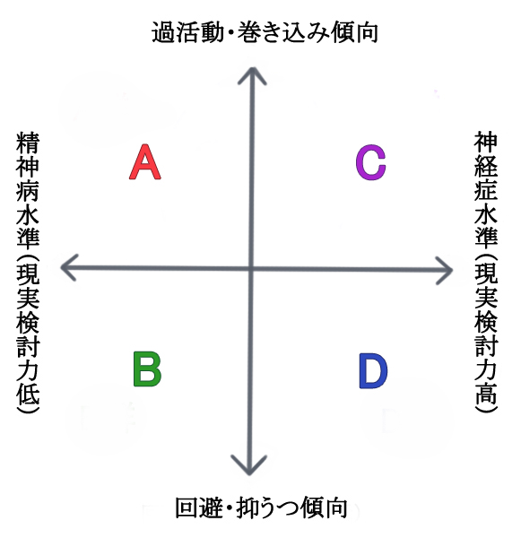 境界性パーソナリティ障害のおおよその類型。 武田龍太郎著「境界性パーソナリティ障害の入院治療（3）」『境界性パーソナリティ障害 - 日本版治療ガイドライン』P215を元に作成。